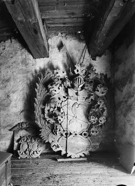 Huvudbanér över Erland Kafle, död 1729. Kategori: (09) VapenHuvudbanér över Erland Kafle, död 1729.